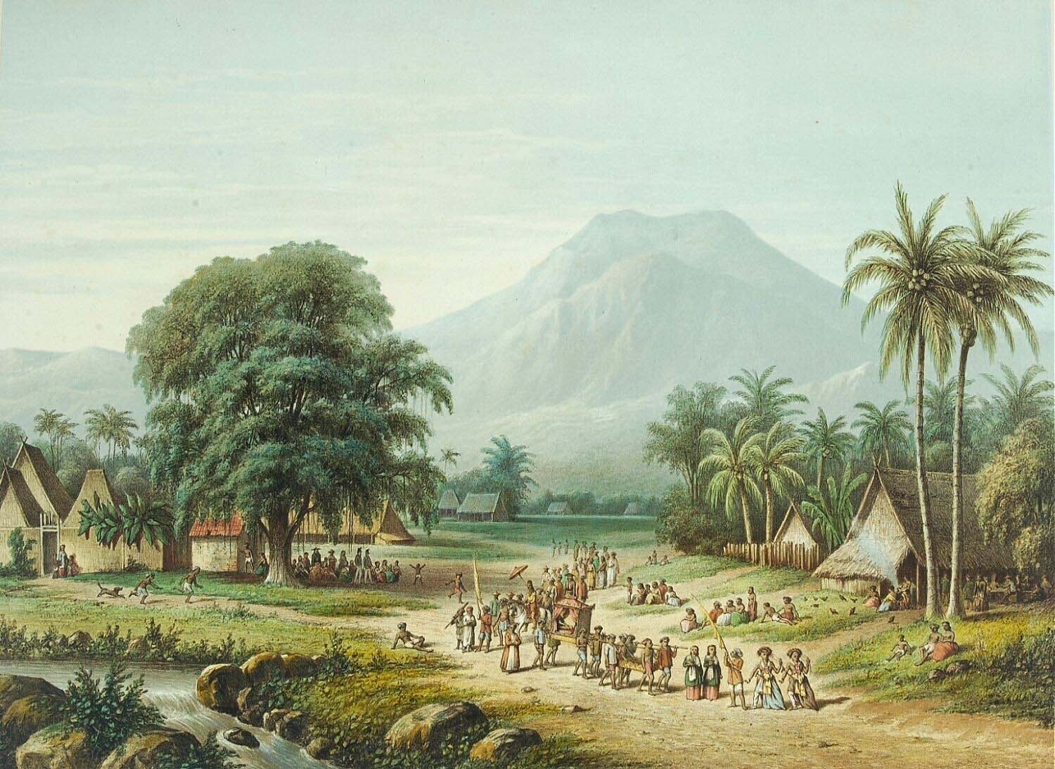 Litho. Litho naar een schilderij van Raden Saleh. Pagina 23 van de map "De Indische Archipel", Den Haag, 1865-1876 met daarin 24 kleurenlitho's, van objectnr. 3728-430 t/m 3728-479.. Een bruiloftsfeest met op de achtergrond de berg Salak